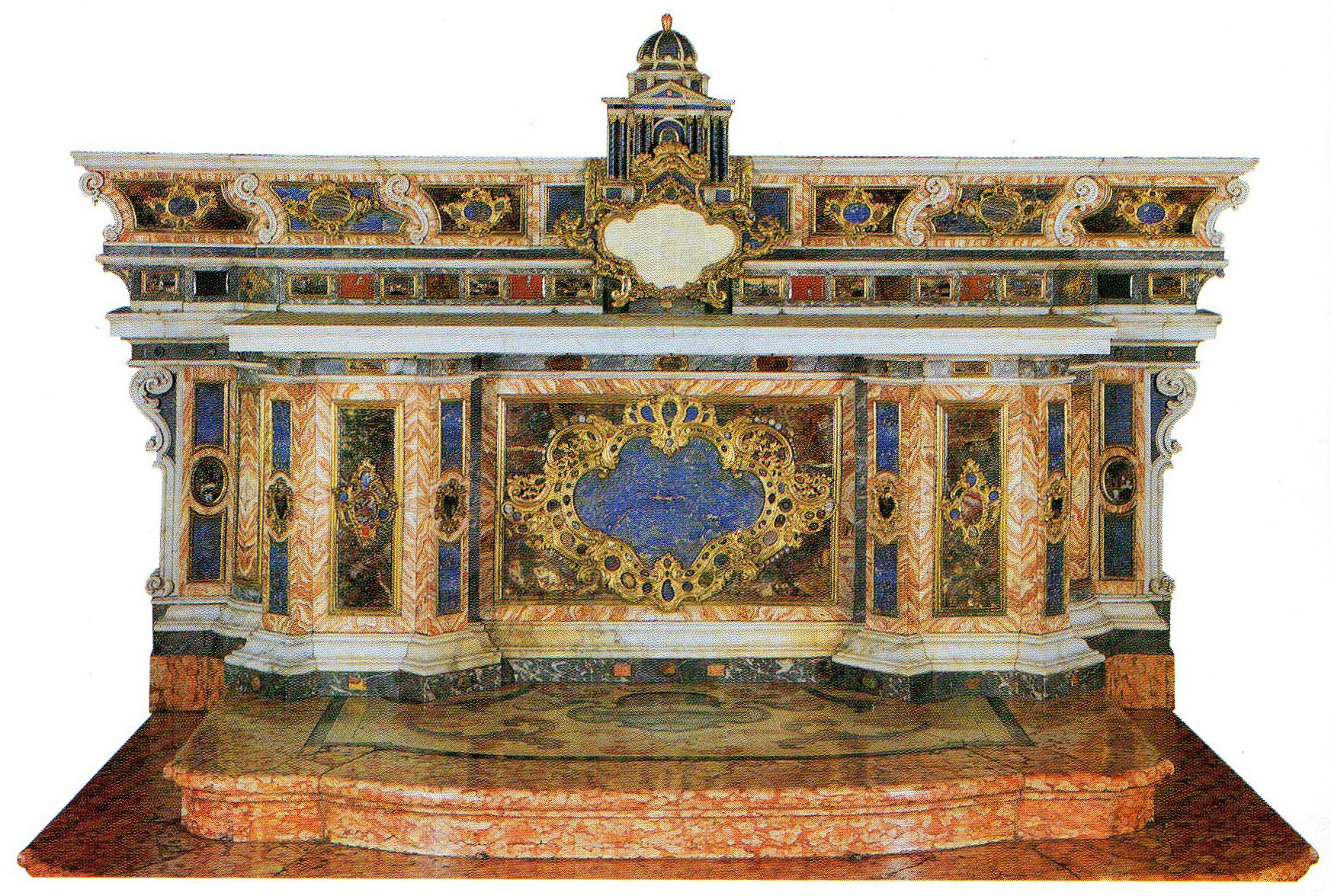 San_lorenzo_brescia_altare_madonna_della_provvidenza.jpg